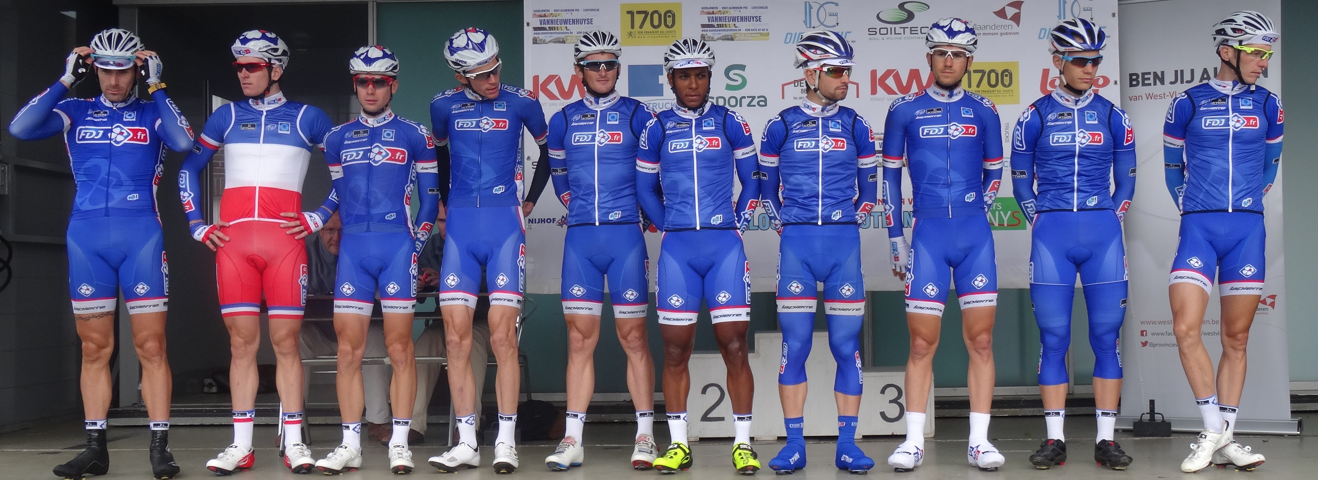 Reportage photographique réalisé le mercredi 24 septembre à l'occasion du départ et du début de la course du Circuit du Houtland 2014 à Lichtervelde, Belgique.